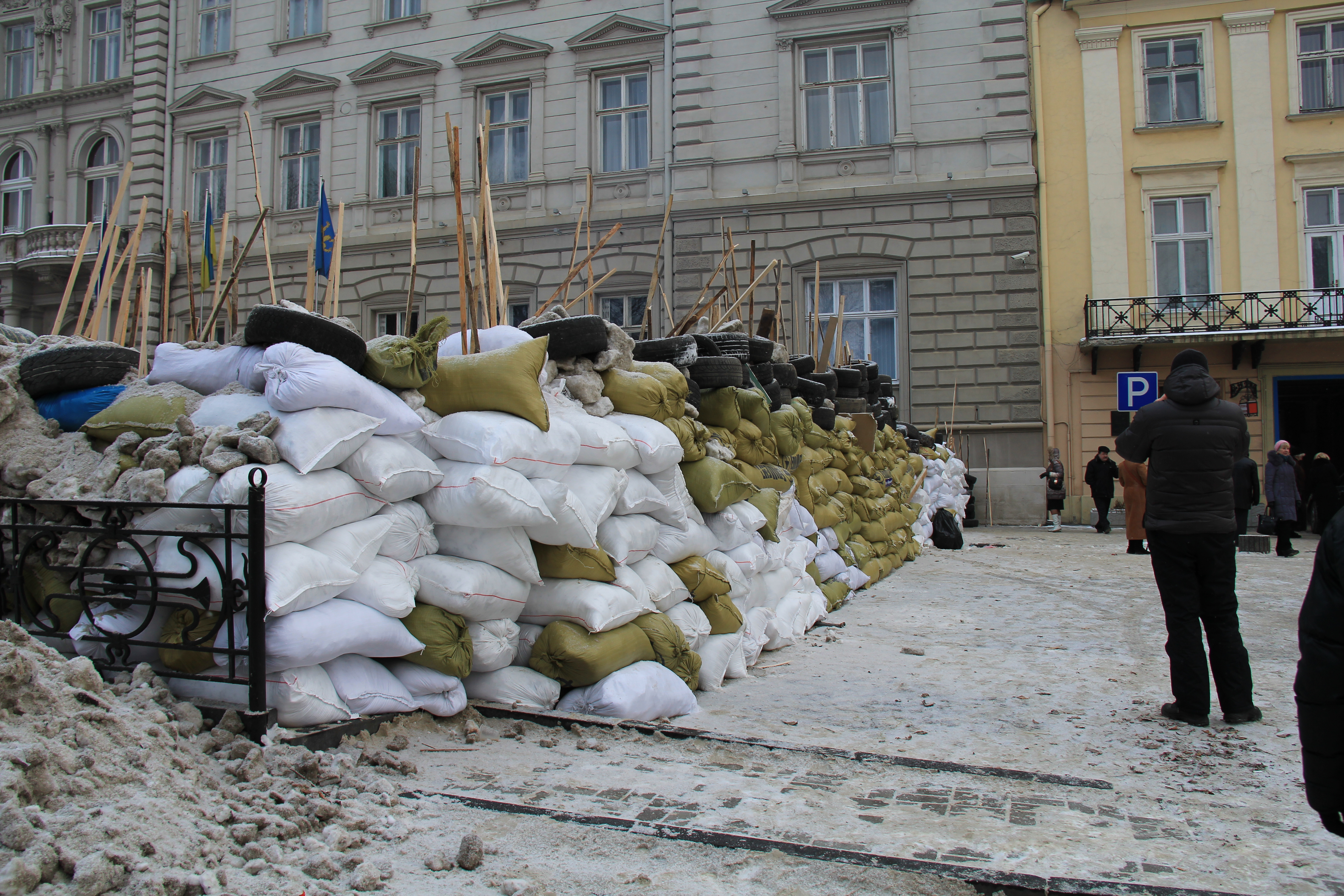 Барикади_ЛОДА24 січня